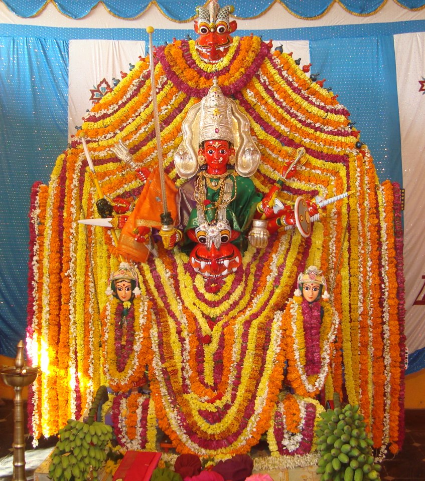 ಕನ್ನಡ: ಶ್ರೀ ಮಾರಿಕಾಂಬ ದೇವಿ (ಗ್ರಾಮ ದೇವಿ ದ್ಯಾಮವ್ವ ) ... ಹಳೂರು . ಮುಂಡಗೋಡ